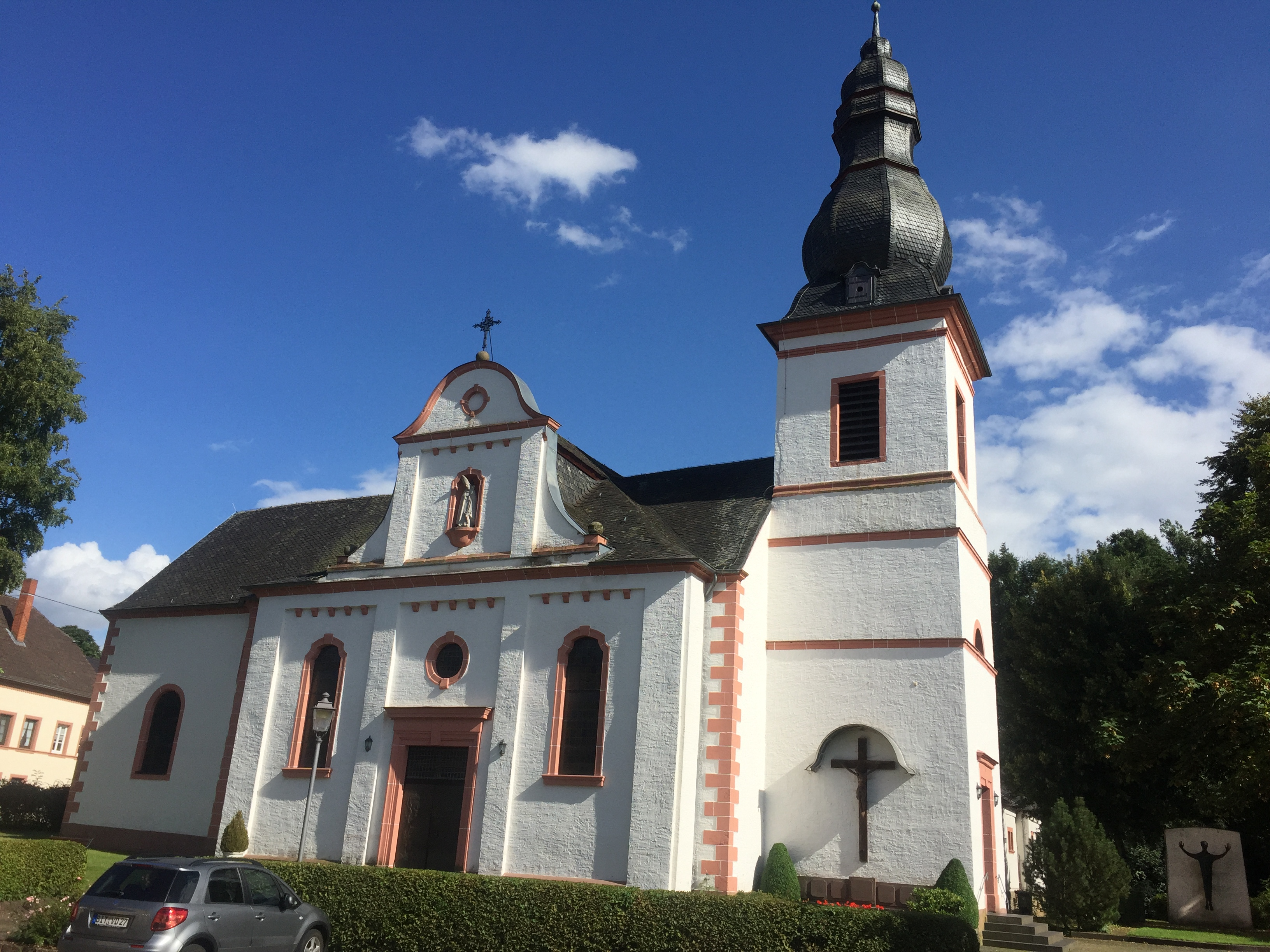 Iglesia en Köperich